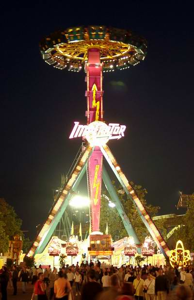 Cannstatter Volksfest in Stuttgart